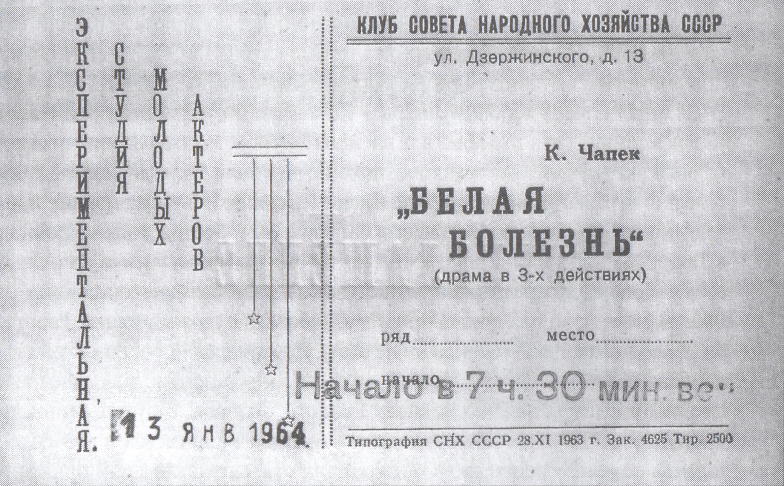 Приглашение на спектакль "Белая болезнь" в котором В. Высоцкий играл в 1960-х годах